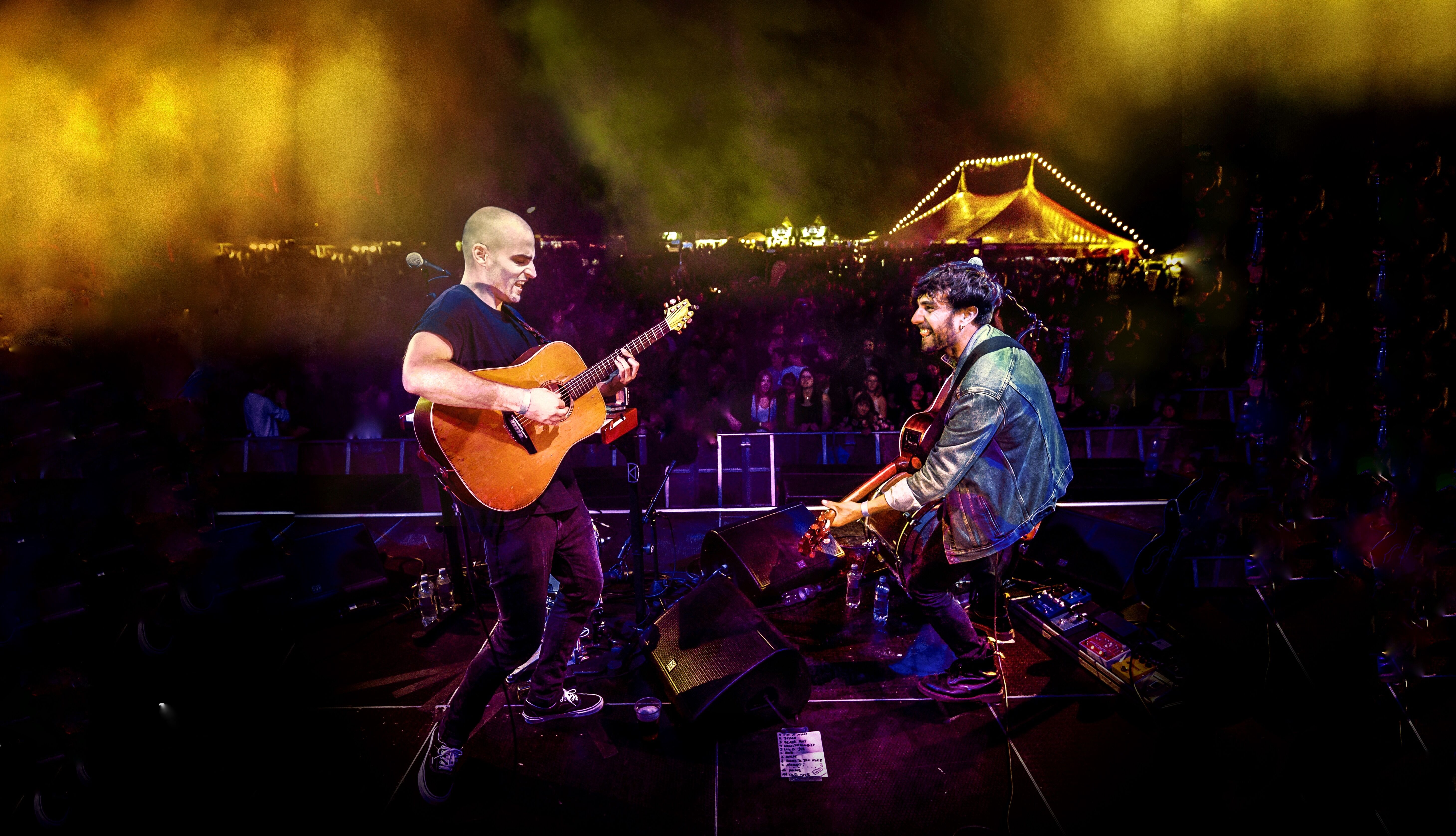 Live auf dem "Rock am Weier" Wil, Schweiz